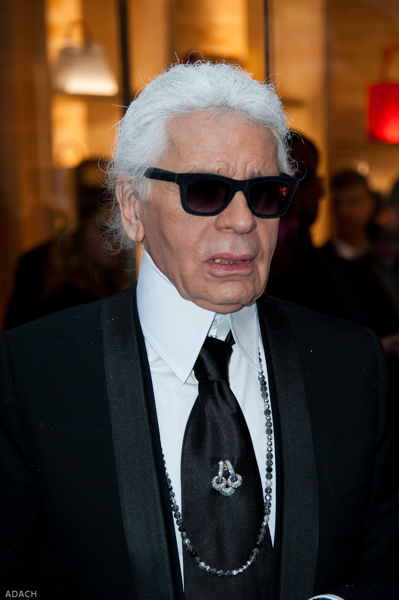 Fendi store opening - Karl Lagerfeld